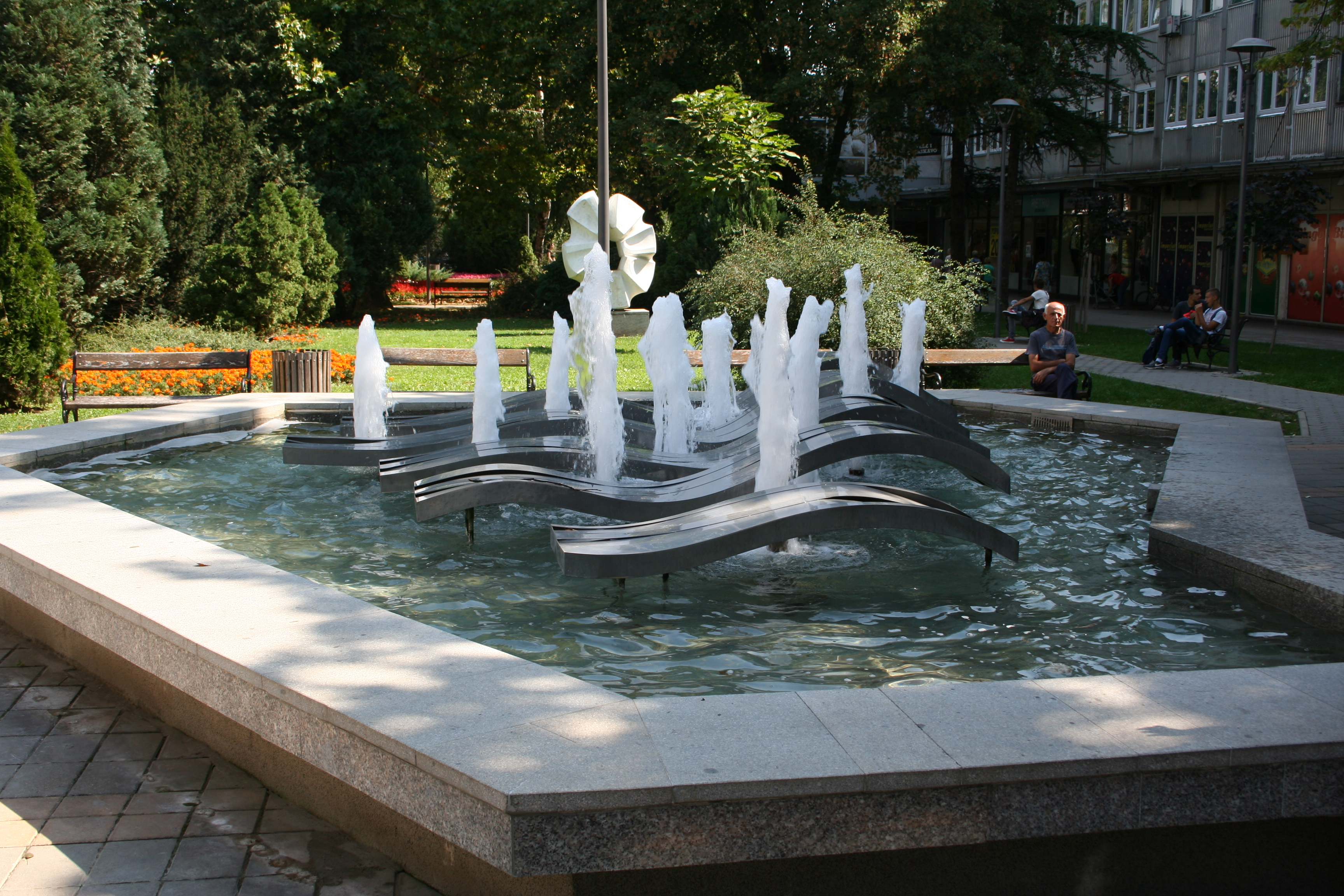 Spomenici Valjevo